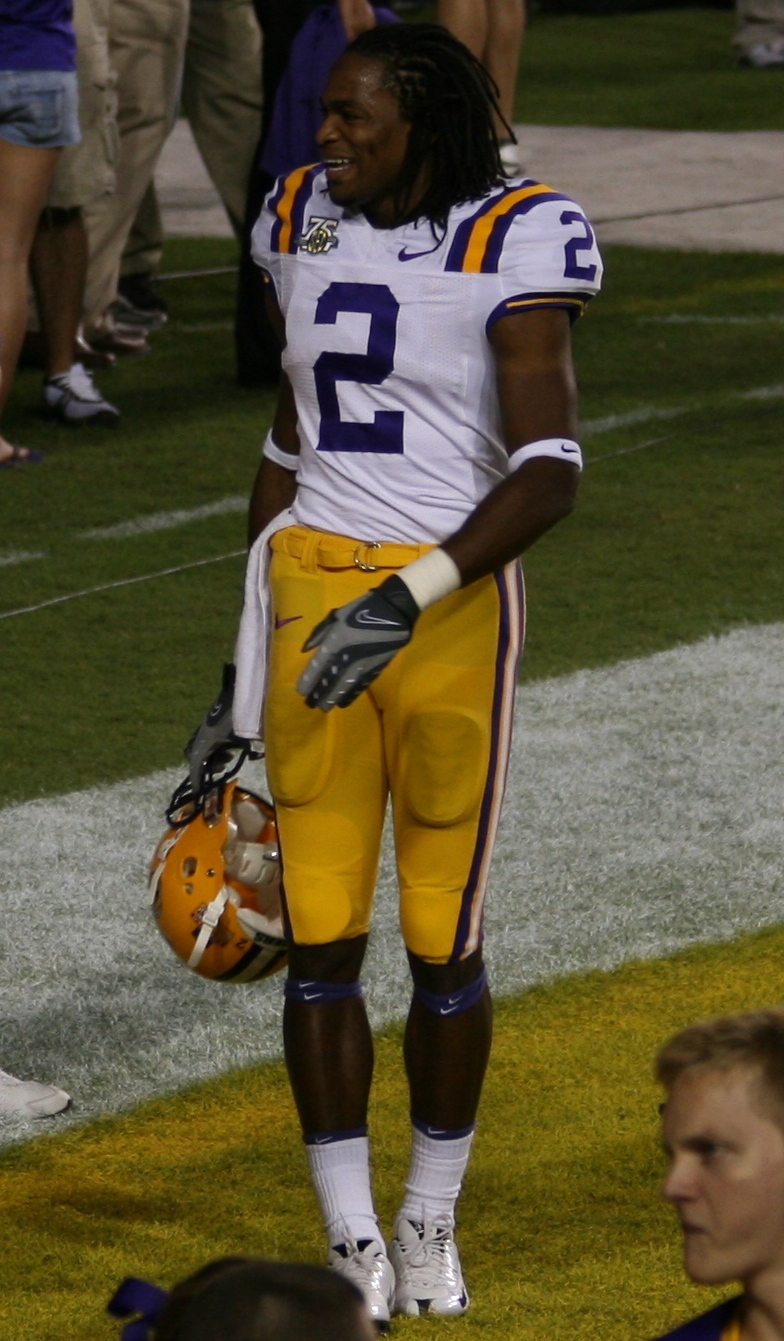 Demetrius Byrd